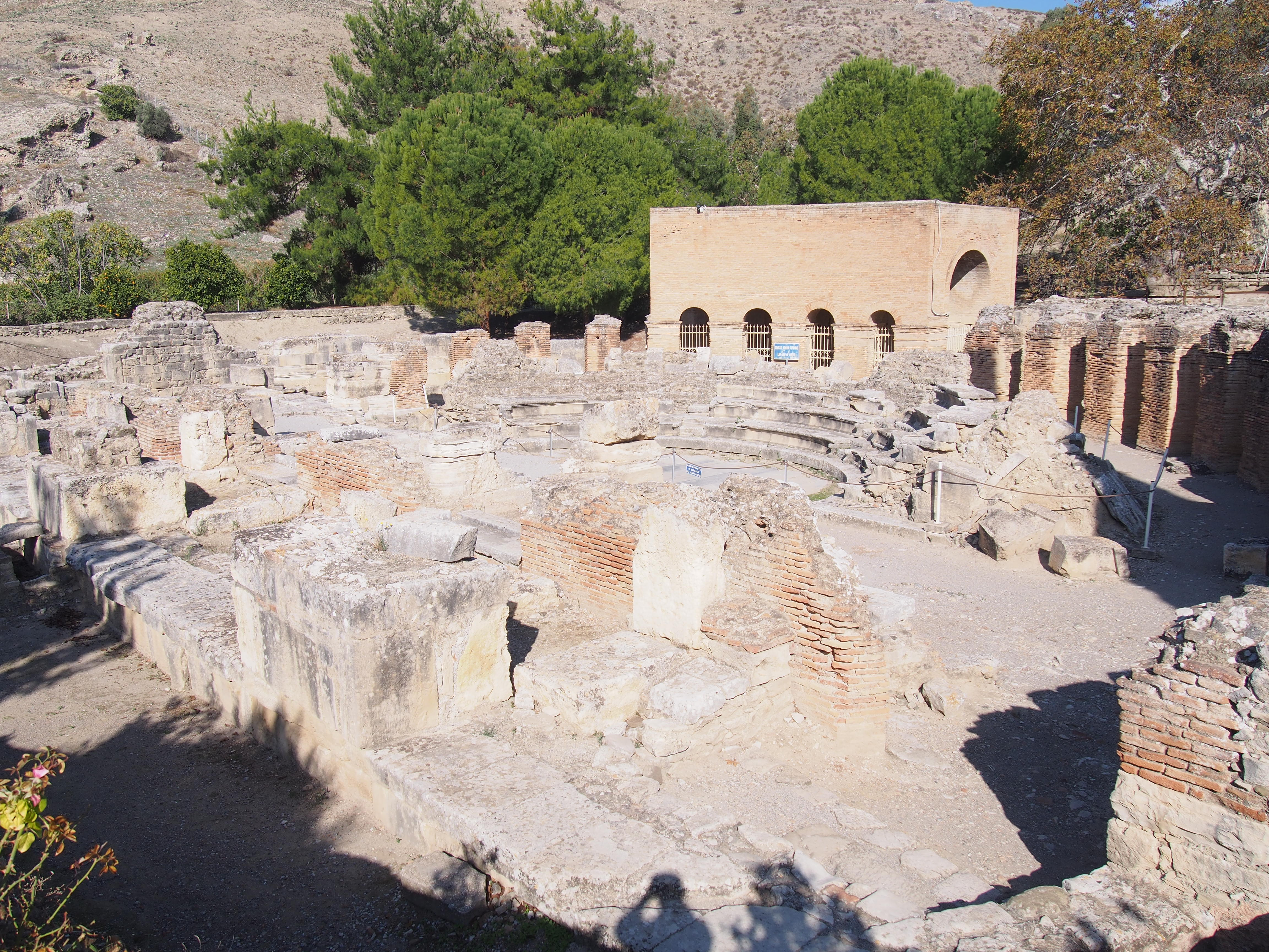 Ωδείο Γόρτυνας«Ωδείο Γόρτυνας»